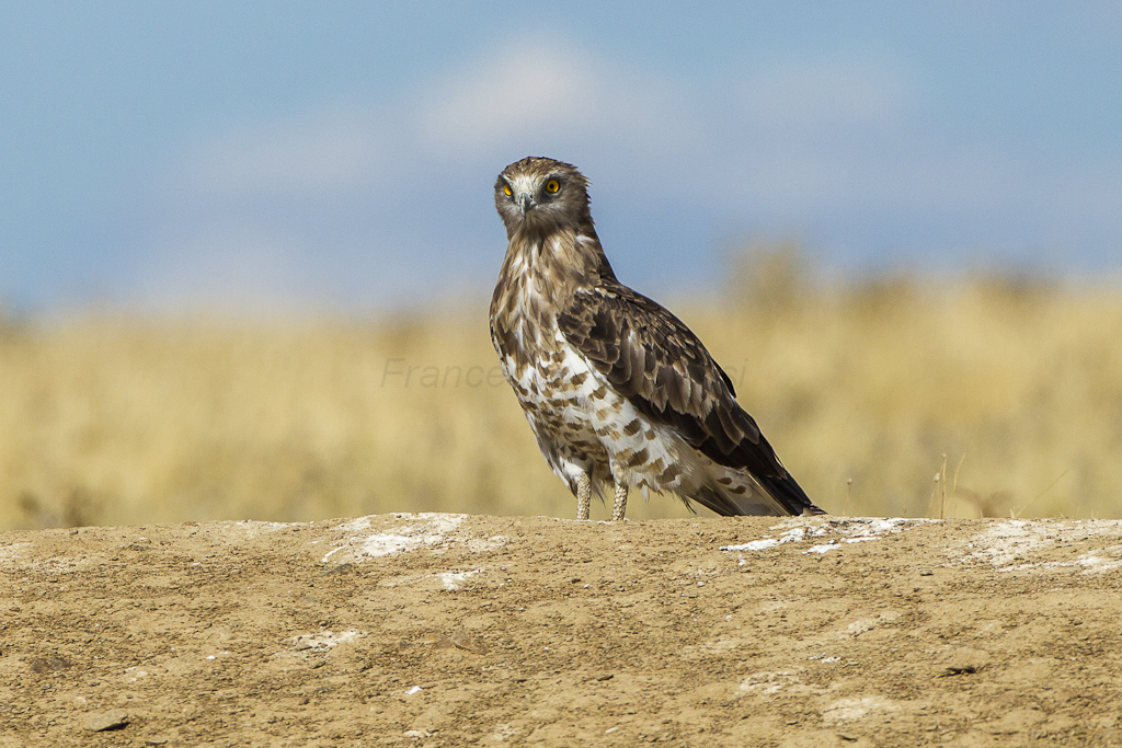 Short-toed Eagle - Castuera - Estremadura_S4E6251